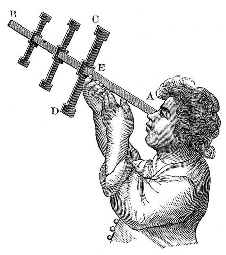 Jakobsstab